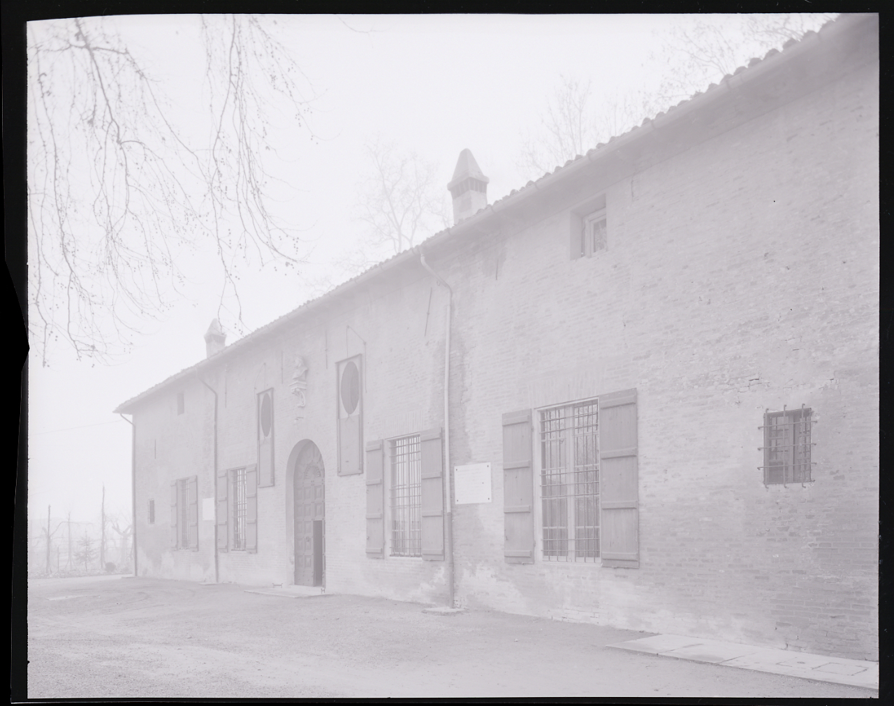 Servizio fotografico : Scandiano, 1965 / Paolo Monti. - Buste: 3, Fototipi: 3 : Negativo b/n, gelatina bromuro d'argento/ pellicola ; 10x12. - ((Serie costituita da 3 negativi identificati con i nn.: 12196-12197. La suddetta serie è contenuta nella scatola identificata con la numerazione 12001-12500G. - Occasione: Documentazione per la pubblicazione: Emilio CECCHI, Natalino SAPEGNO (a cura di), Storia della Letteratura Italiana, 9 voll., Milano, Garzanti, 1966 e segg. - Fonte: Agenda di Paolo Monti: R 1 - Monti/ 1 aprile 1963 - 6 giugno 1964/ 6000-8193 (1963-1964), presso Archivio Paolo Monti